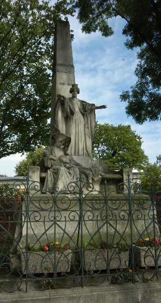 Denkmal am Flötzersteig an der Einfriedung des Wilhelminenspitals in Wien-Ottakring